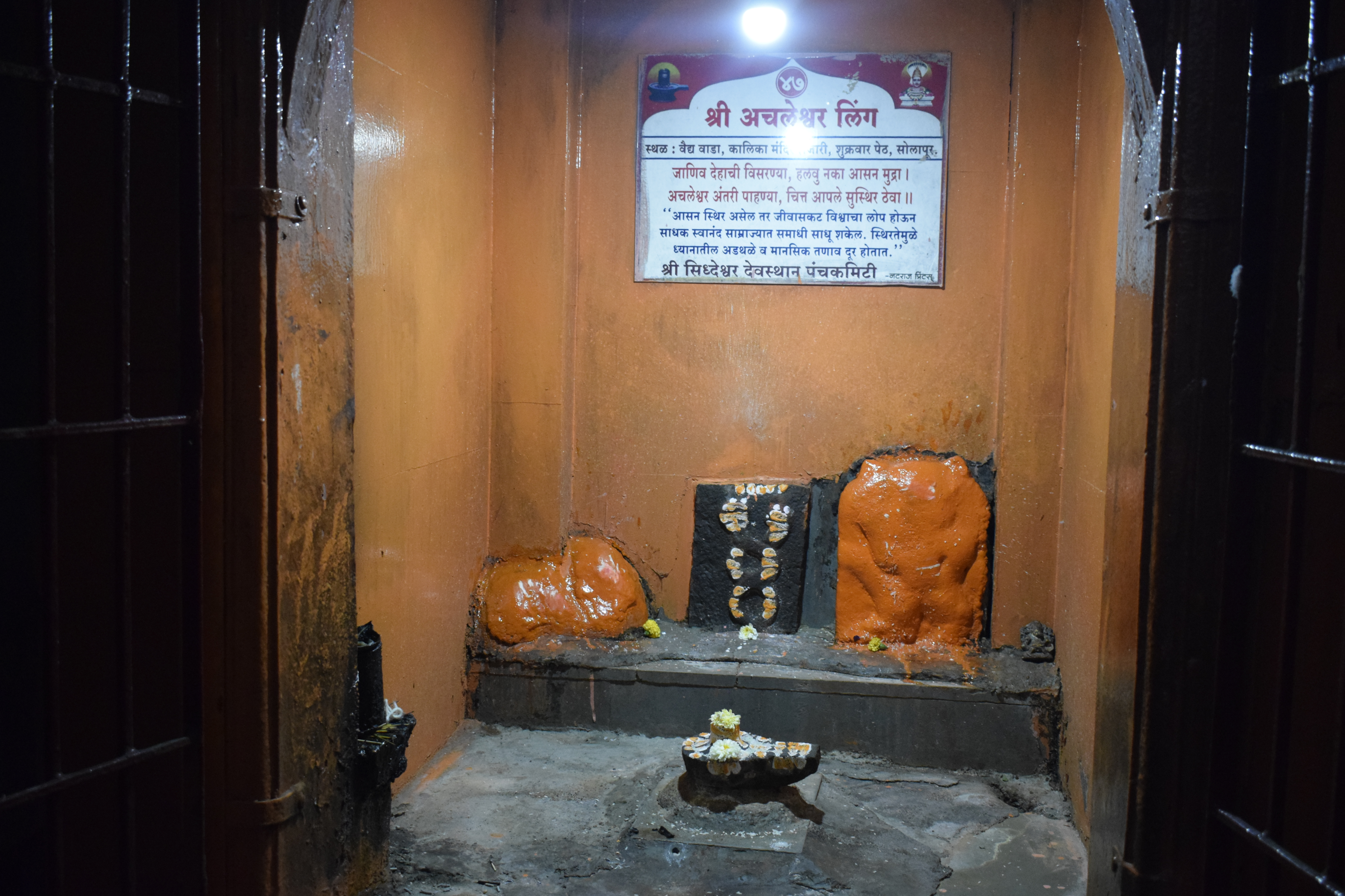 श्री अचलेश्वर लिंग